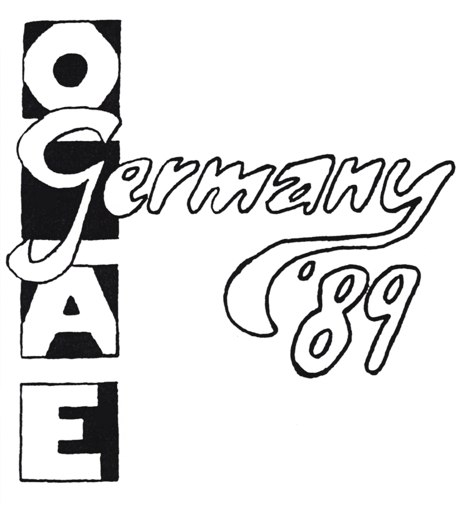 Logo OGAE Song Contest 1989